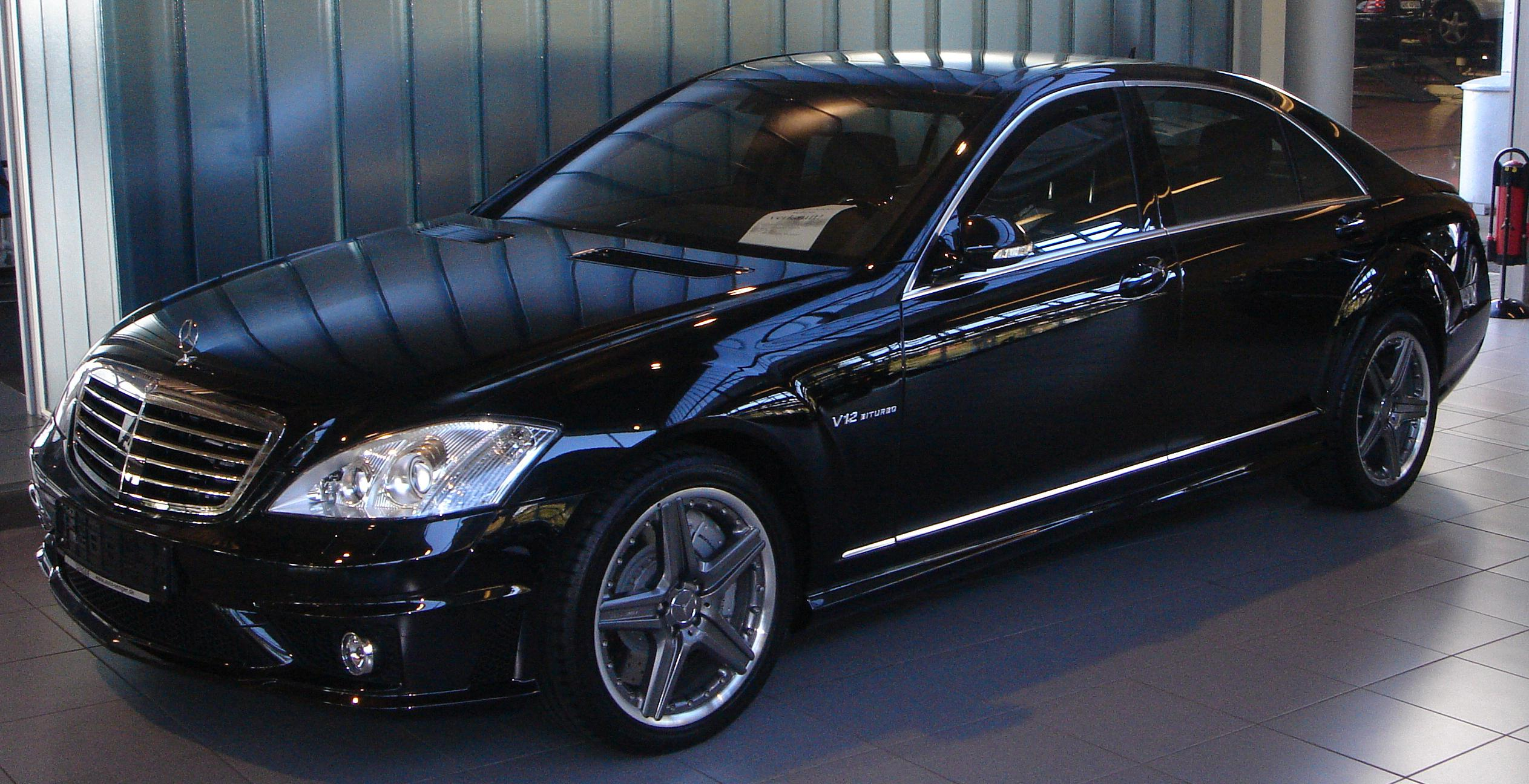 Mercedes-Benz W221 - S 65 AMG